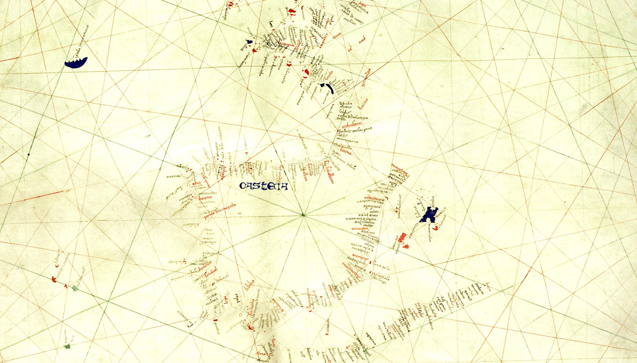 Портолан 1492 года